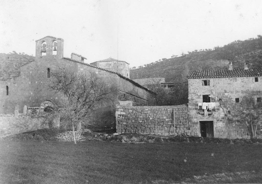 Monestir d'estil romànic de Santa Maria de Gualter, a Gualter. Cèsar August Torras i Ferreri (Entre 1890 i 1923)